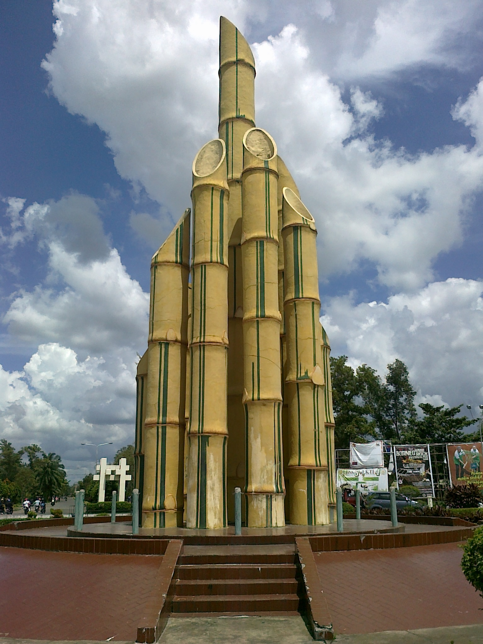 Monumen Sebelas Digulis di Kota Pontianak